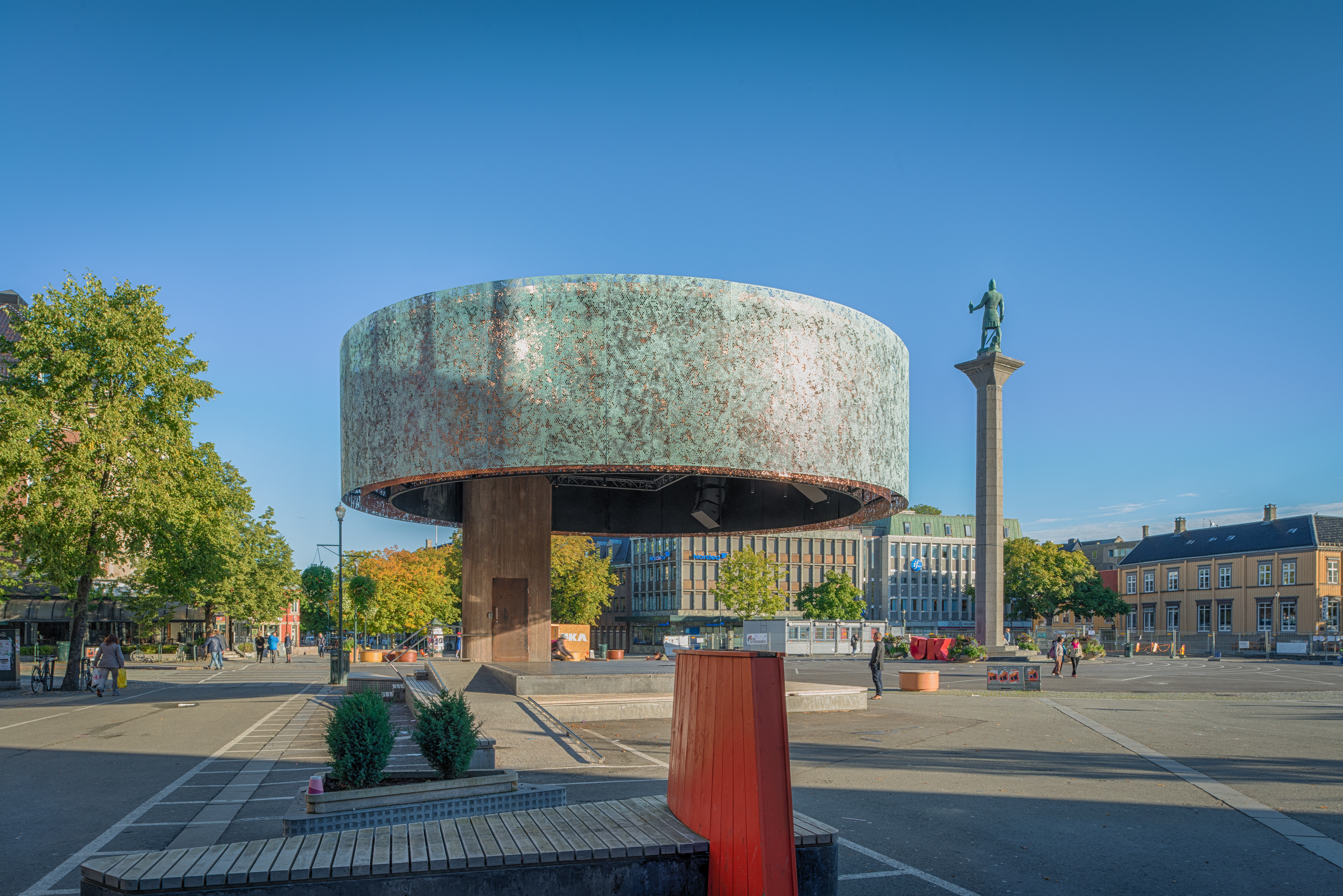 Ny hverdagscene på Torget i Trondheim